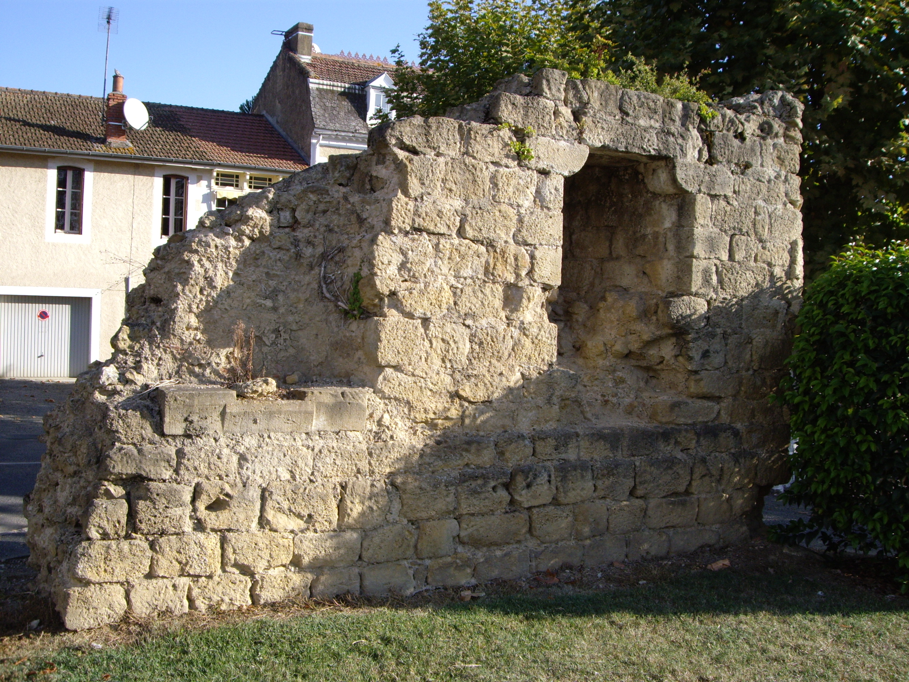 Vestige des remparts, place de la République (Mirande, Gers France)